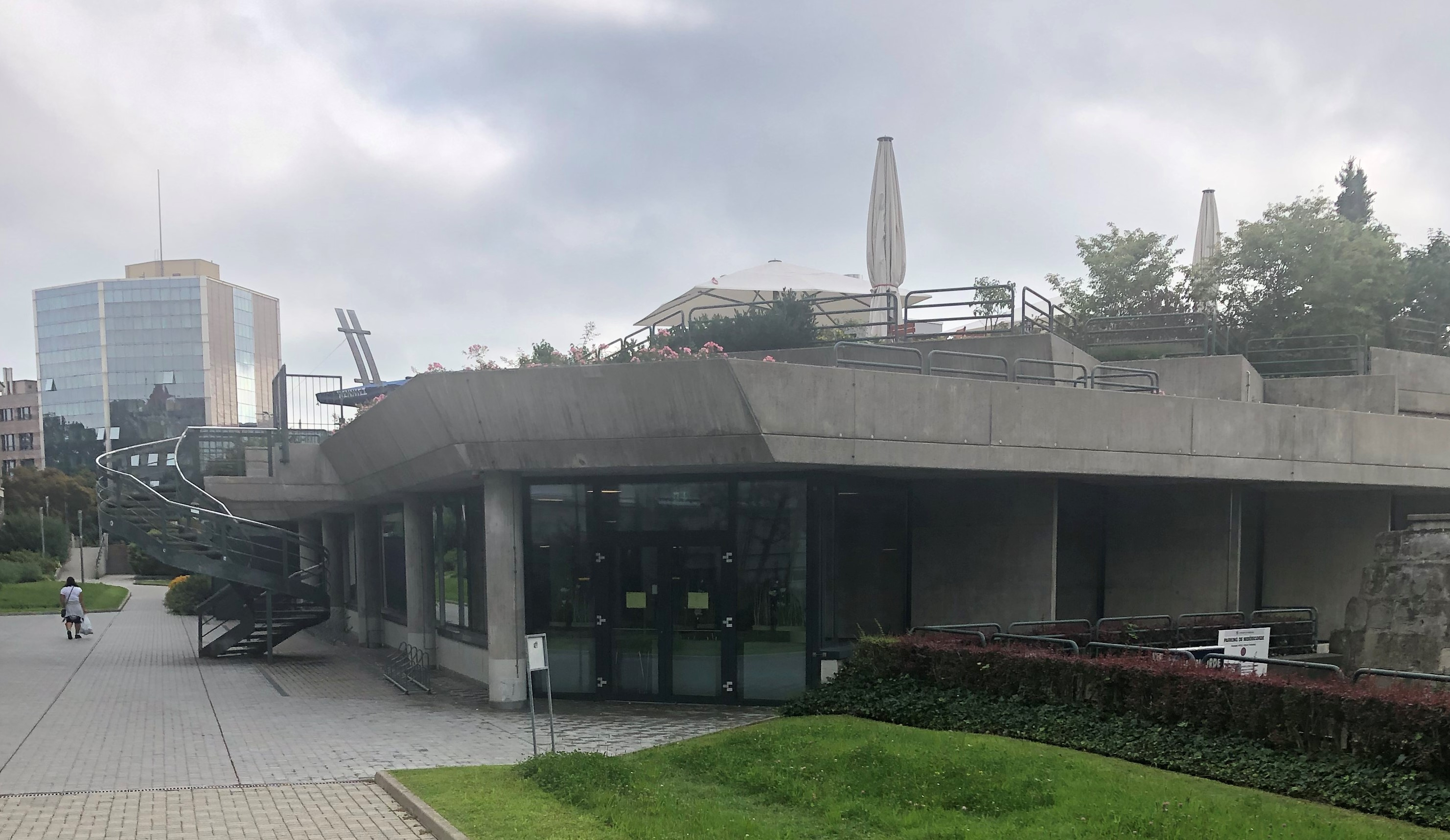 Universität Freiburg (Schweiz): Mensa 1 Miséricode